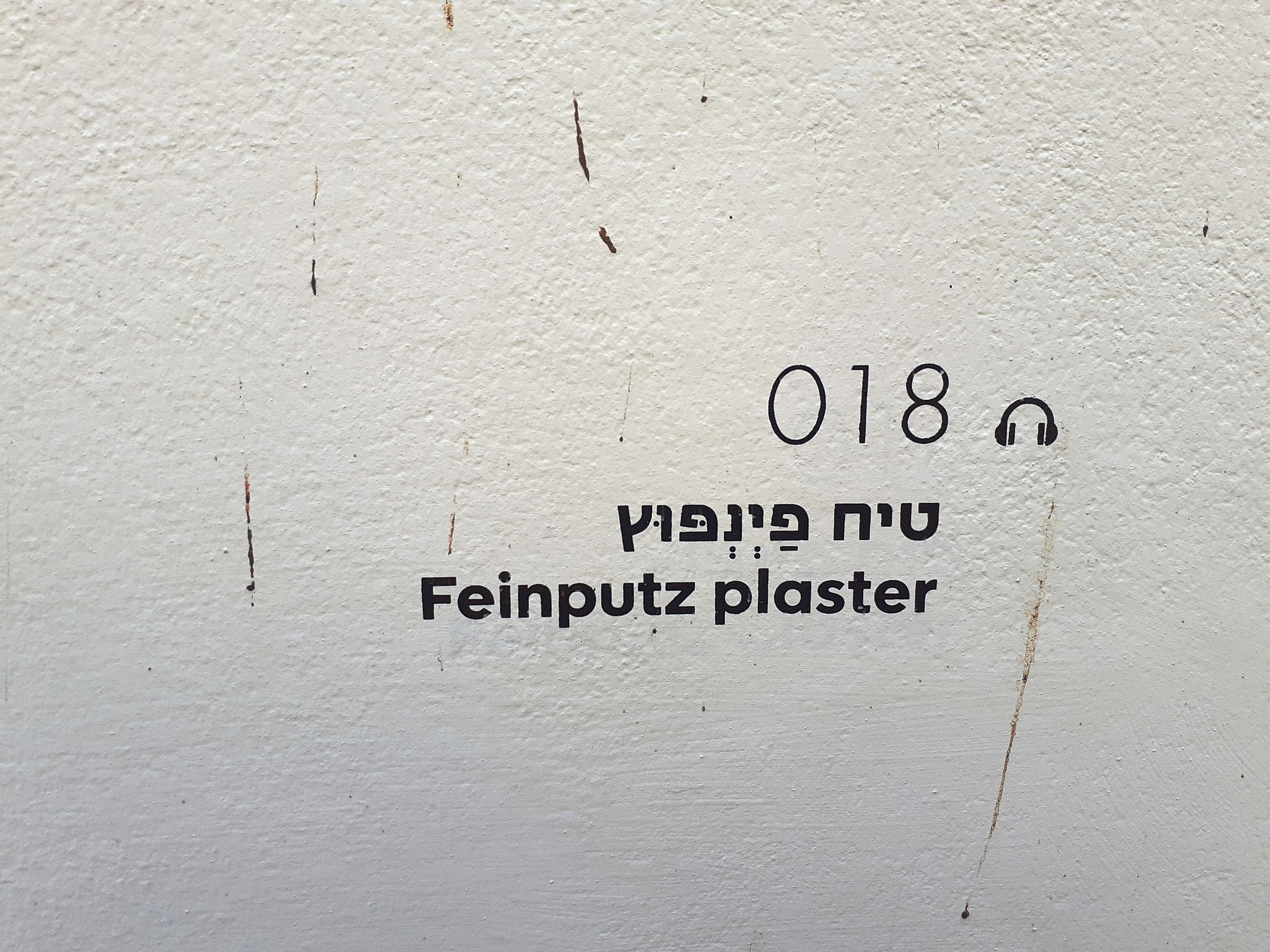 Der Beit Liebling (בֵּית לִיבְּלִינְג) / das Lieblinghaus - Station 18 der Audiotour durch Haus und Garten, Quartier Bialik, Tel Aviv-Jaffa